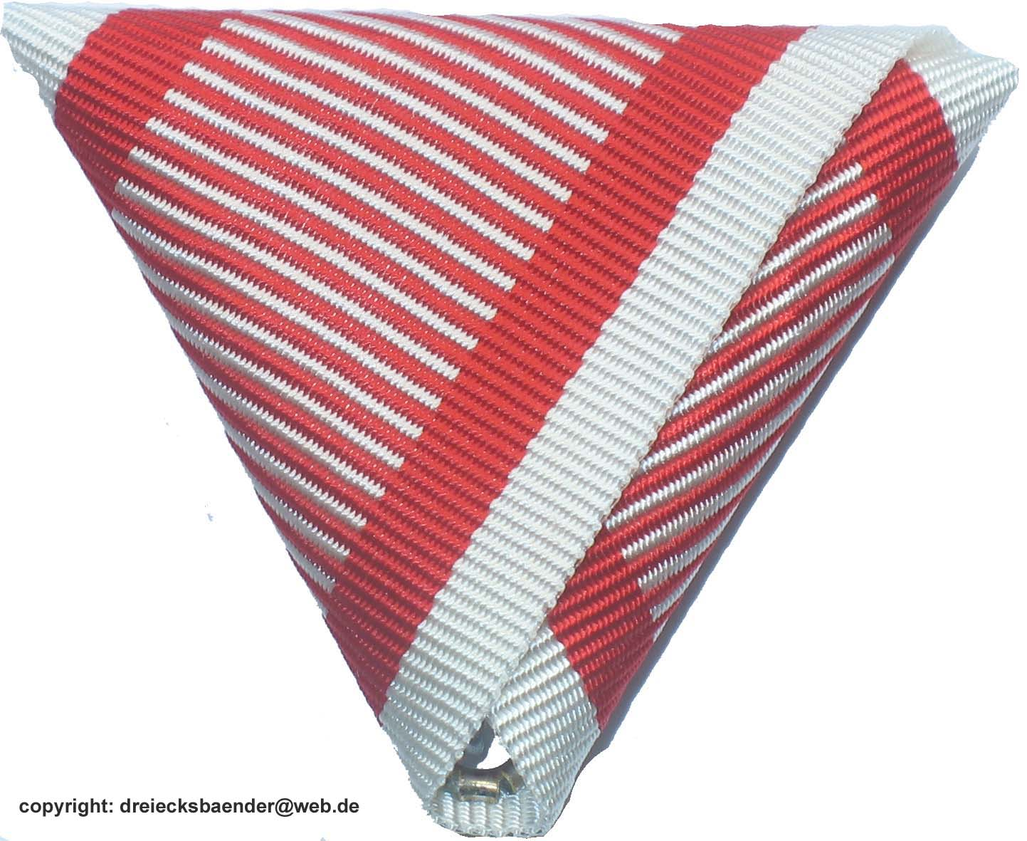 Tapferkeitsband